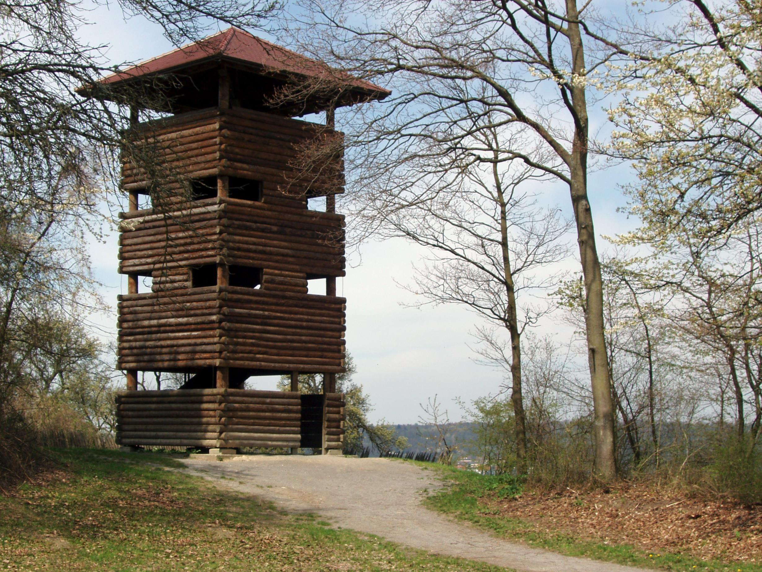 Beschreibng: Dieses Bild zeigt den Wachturm der Eppinger Linie, auch Chartaque genannt am südlichen Rand des Ortes Niefern-Öschelbronn.